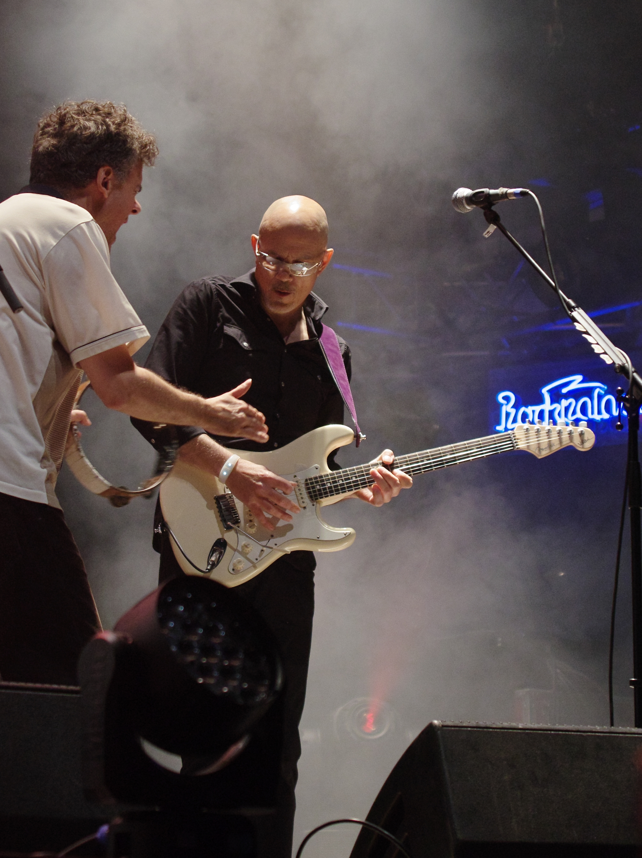 James (band) auf dem Haldern Pop Festival 2013. Hauptbühne. Besetzung: Tim Booth (Gesang) Jim Glennie (Bass) Larry Gott (Gitarre) Saul Davies (Gitarre, Violine, Percussion) Mark Hunter (Keyboards) Dave Baynton-Power (Schlagzeug) Andy Diagram (Trompete, Percussion)